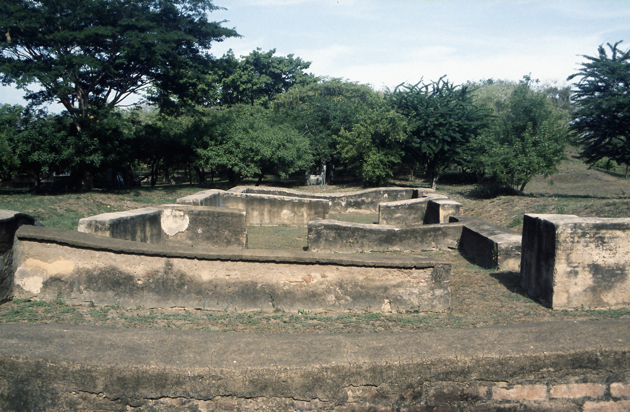 Ruinen des alten Leons, Freigelegte Grundmaueern